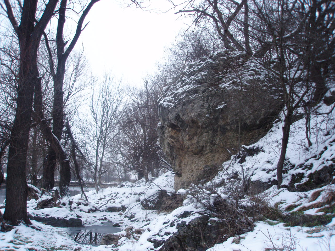 Поречието на р.Осъм-в пределите на с.Смочан